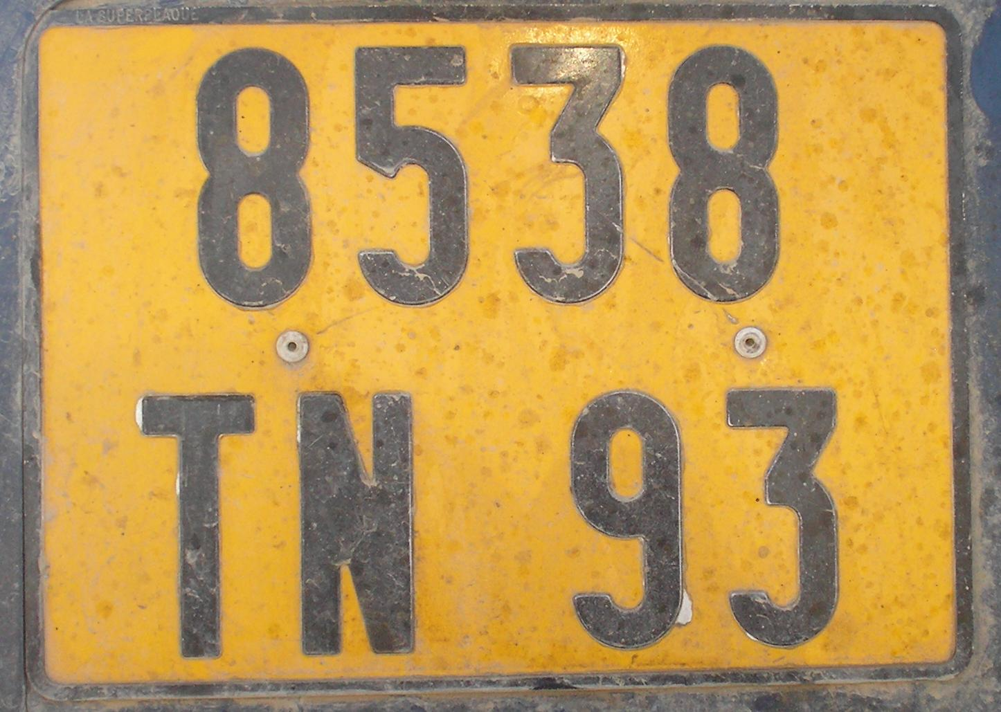 Номерний знак